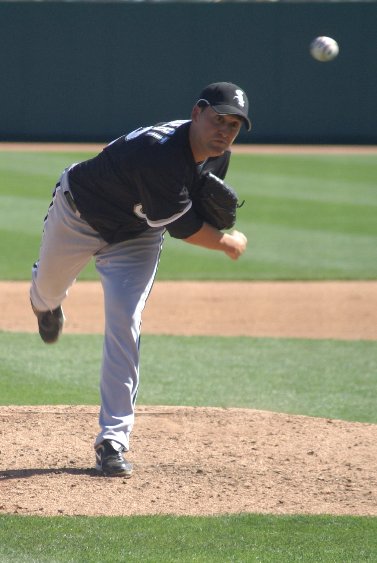 Jack Egbert